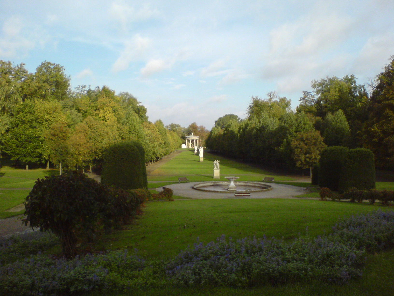 Hauptachse Neustrelitz